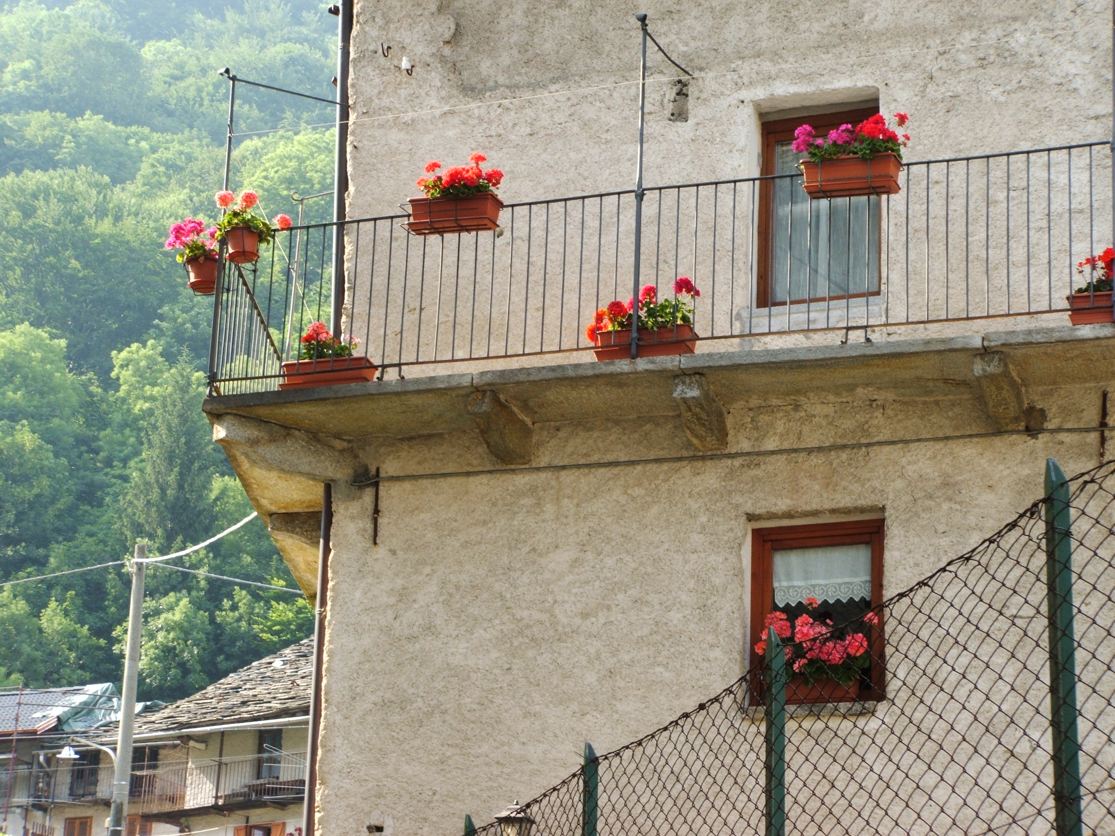 Piedicavallo, comune della Valle Cervo, provincia di Biella (Piemonte, Italia)